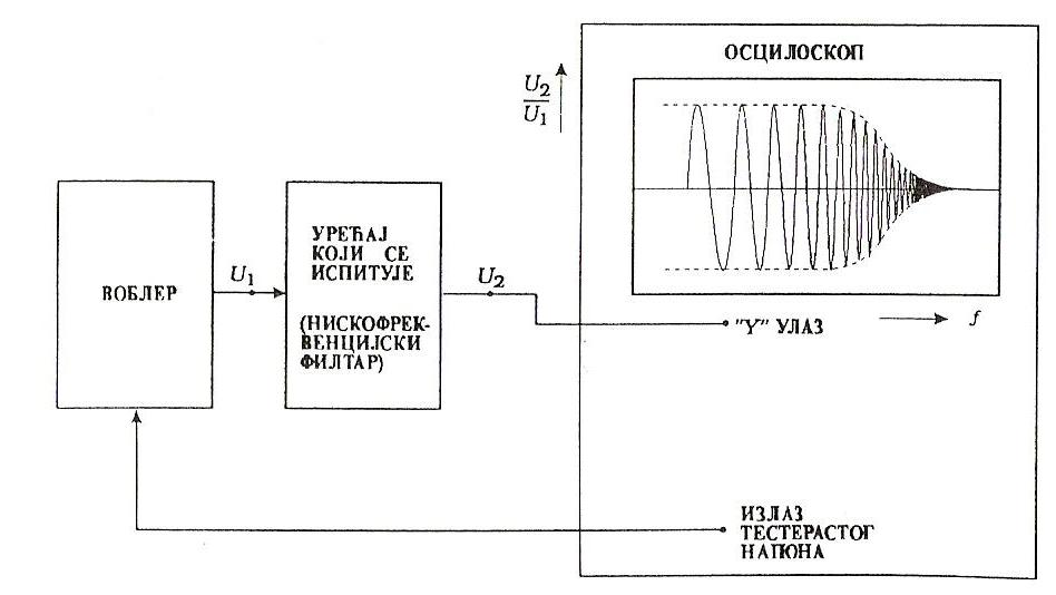 prva slika